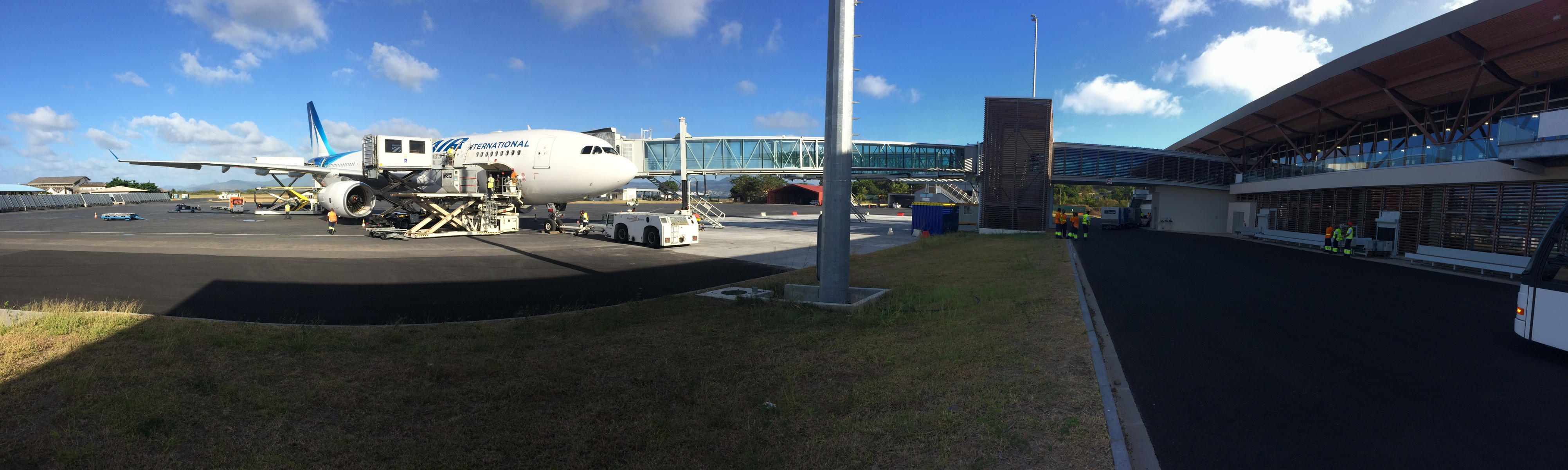 Un A330-200 de chez corsair.